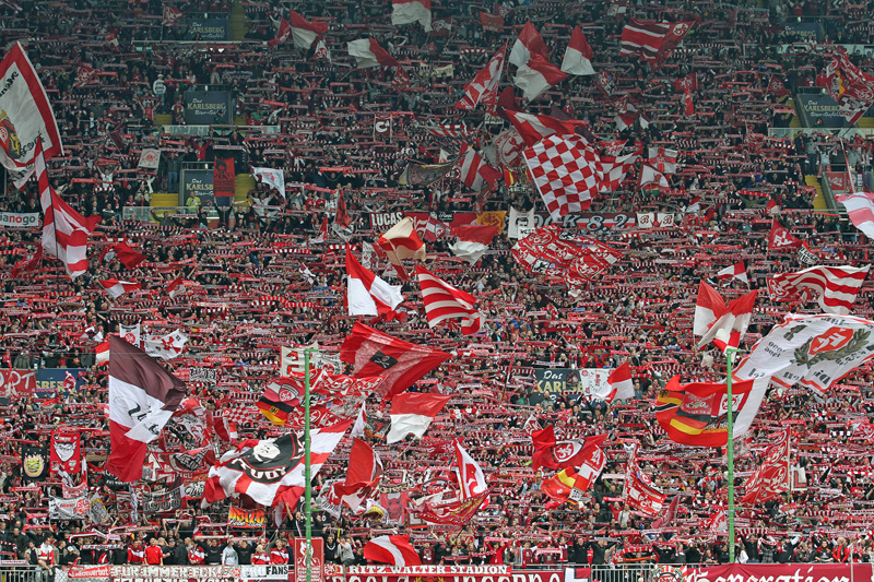 Westkurve beim Spiel gegen den 1. FC Nürnberg am 16. April 2011